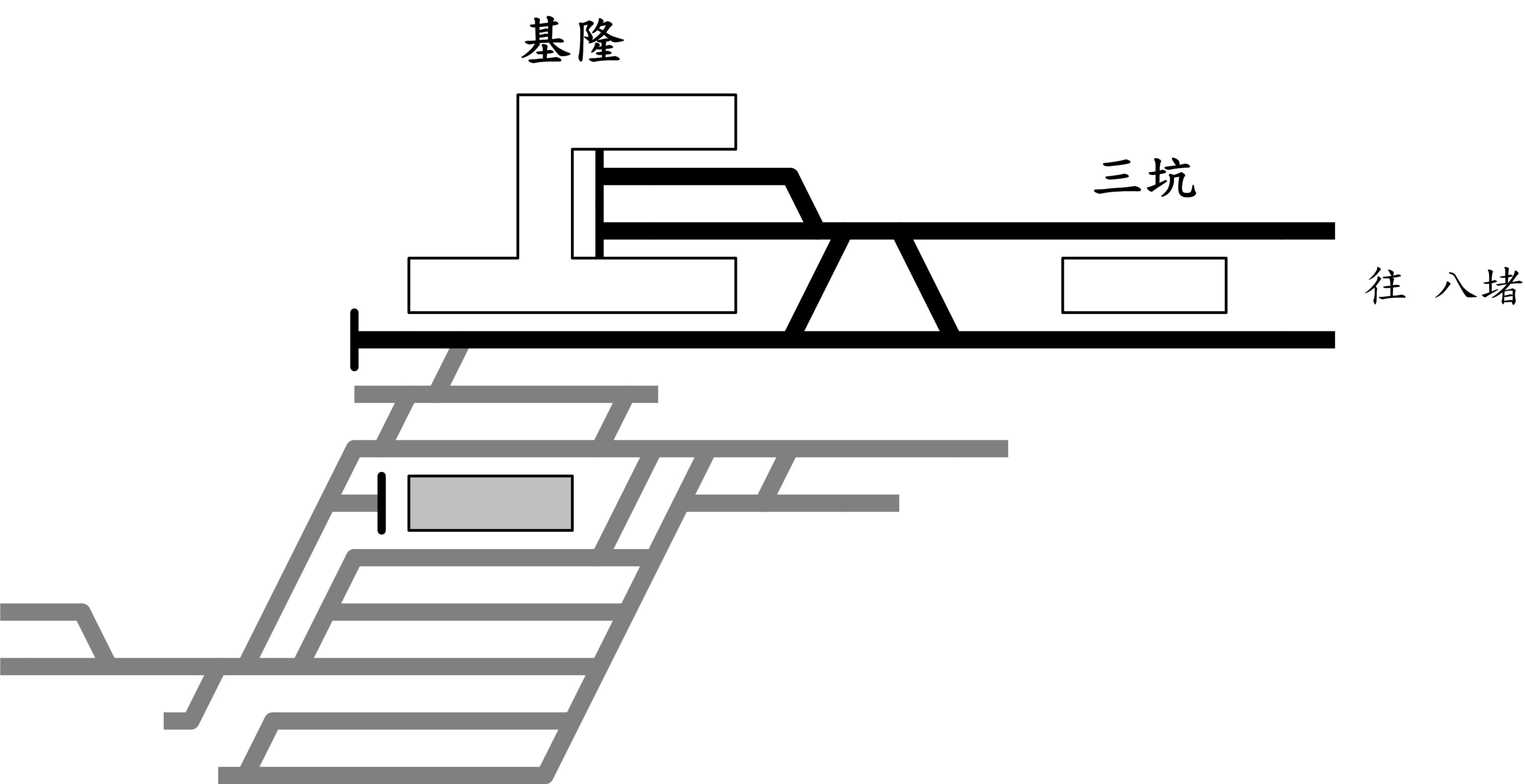 基隆車站軌道圖，使用 Microsoft Visio 繪製。